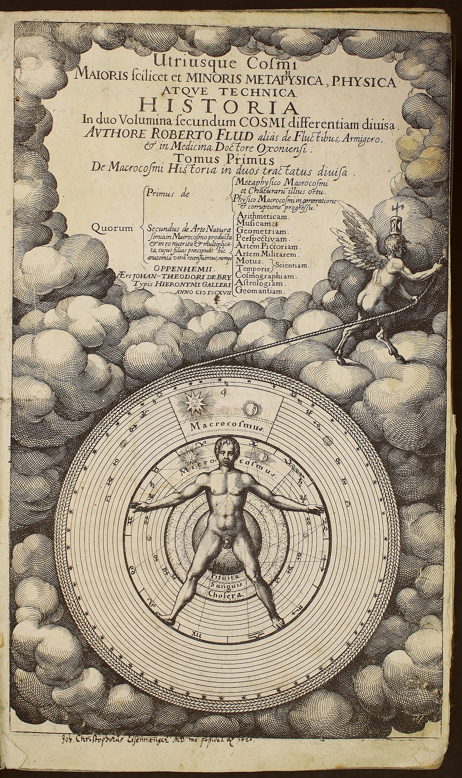 Titelblatt aus dem Werk von Robert Fludd (1574 - 1637): De Macrocosmi Historia : in duos tractatos divisa ; Tractatus 1. (Teil von: Utriusque Cosmi Maioris scilicet et Minoris Metaphysica, Physica Atque Technica Historia). Oppenheim: Johann Theodor de Bry, 1617. Umfang: [1] Bl., 106 [i.e. 206] S., [5] Bl. : zahlr. Ill. Fingerprint: O.a. e-n- o-r- igan 3 1617R 1,1. Wissenschaftliche Stadtbibliothek Mainz: Signatur: III e:2º /349, T. 1,[1]-1,2 (Rara-Bestand).